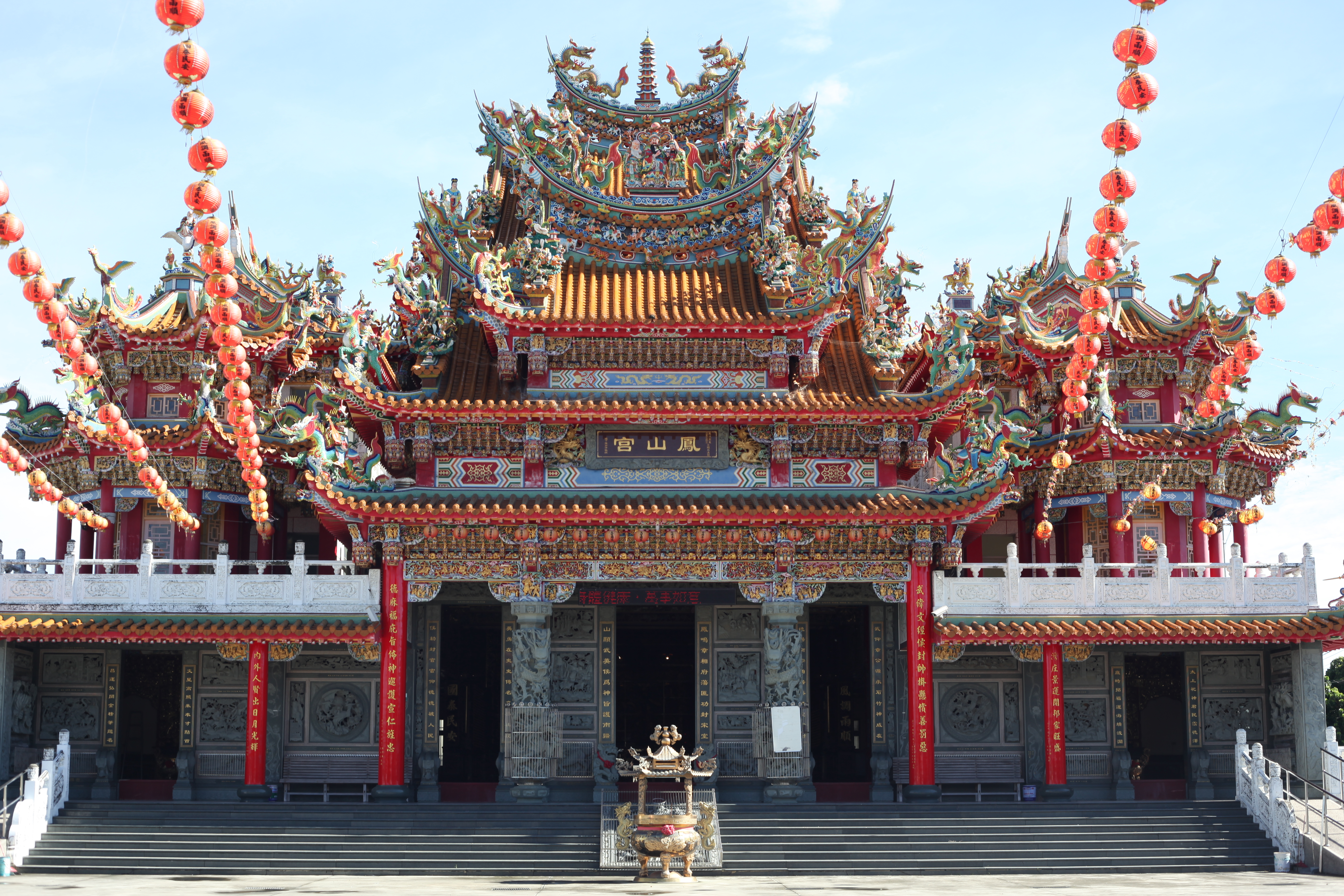 嘉義縣六腳鄉灣北村鳳山宮